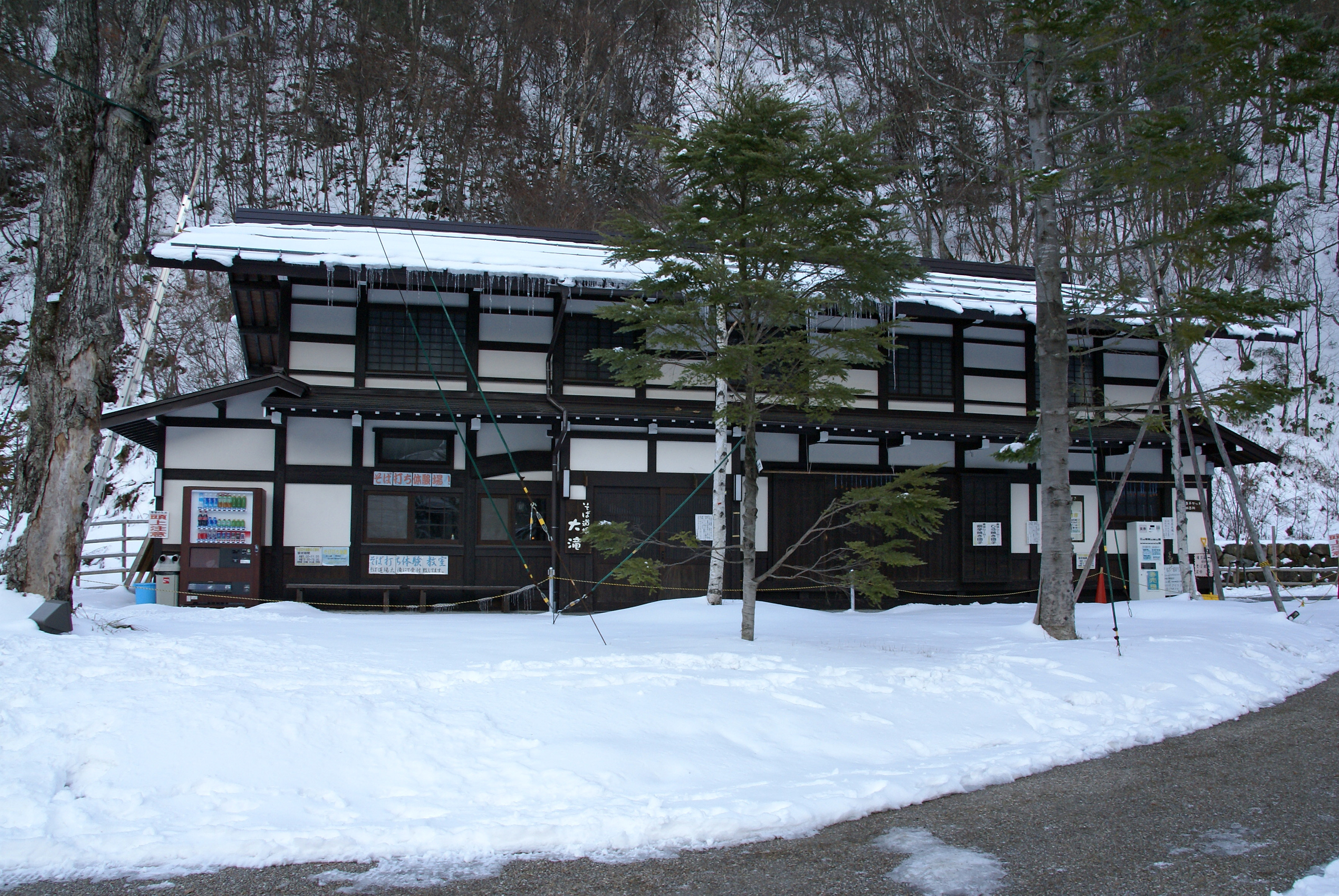 Hirayu-otaki-koen in Takayama, Gifu prefecture, Japan